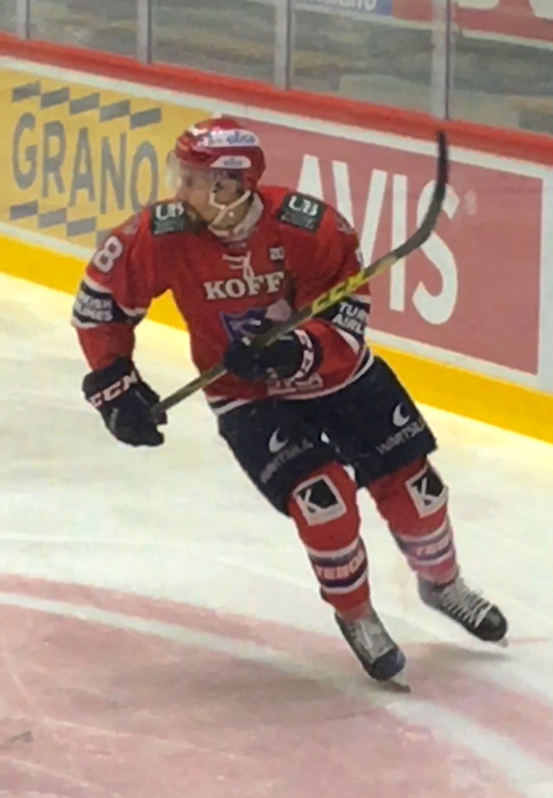 Jääkiekkoilija Daniel Grillfors edustamassa Helsingin IFK:ta 13. lokakuuta 2016 ottelussa HIFK–SaiPa.